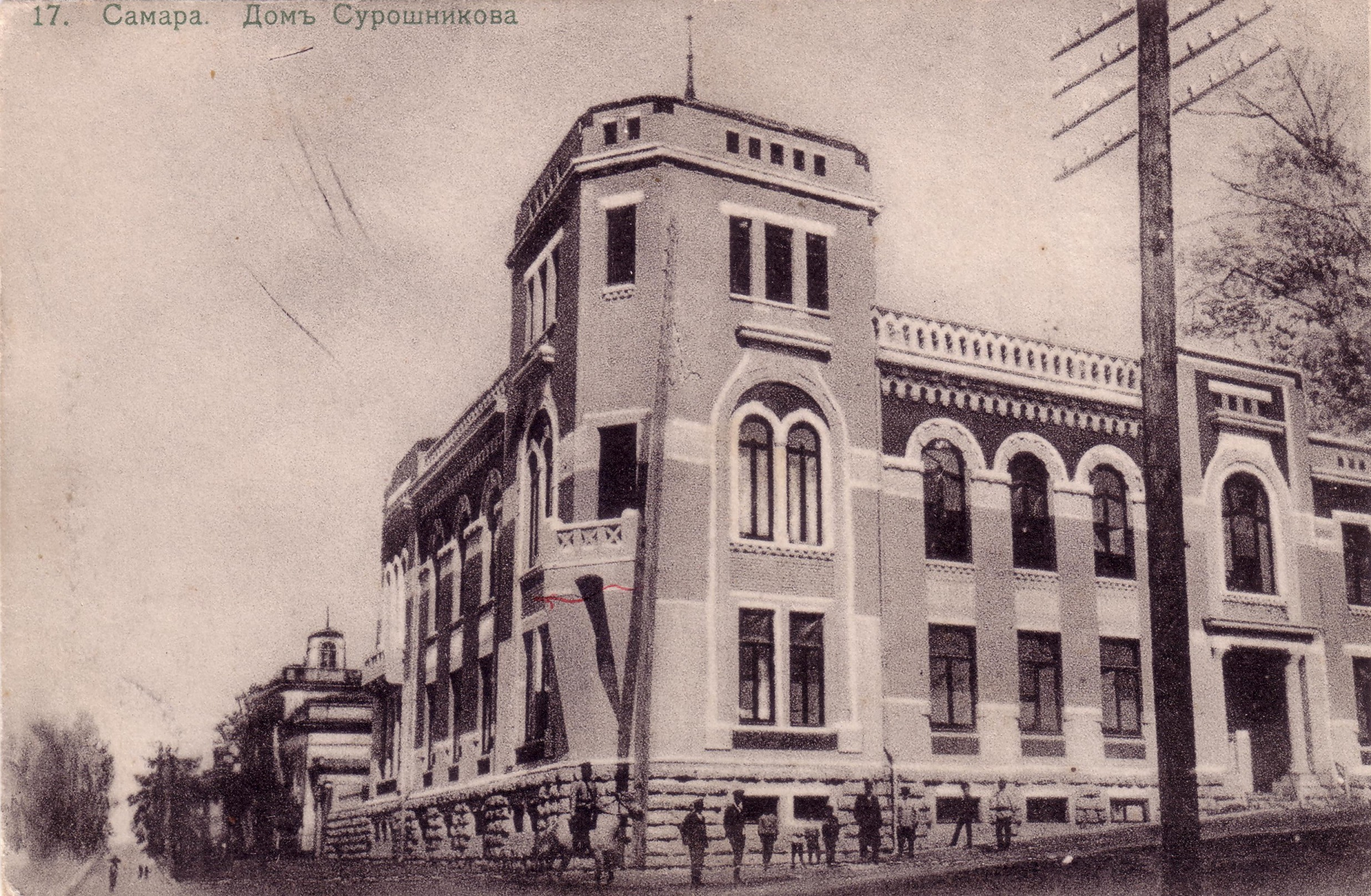 Особняк В. М. Сурошникова в Самаре, арх. Ф. О. Шехтель